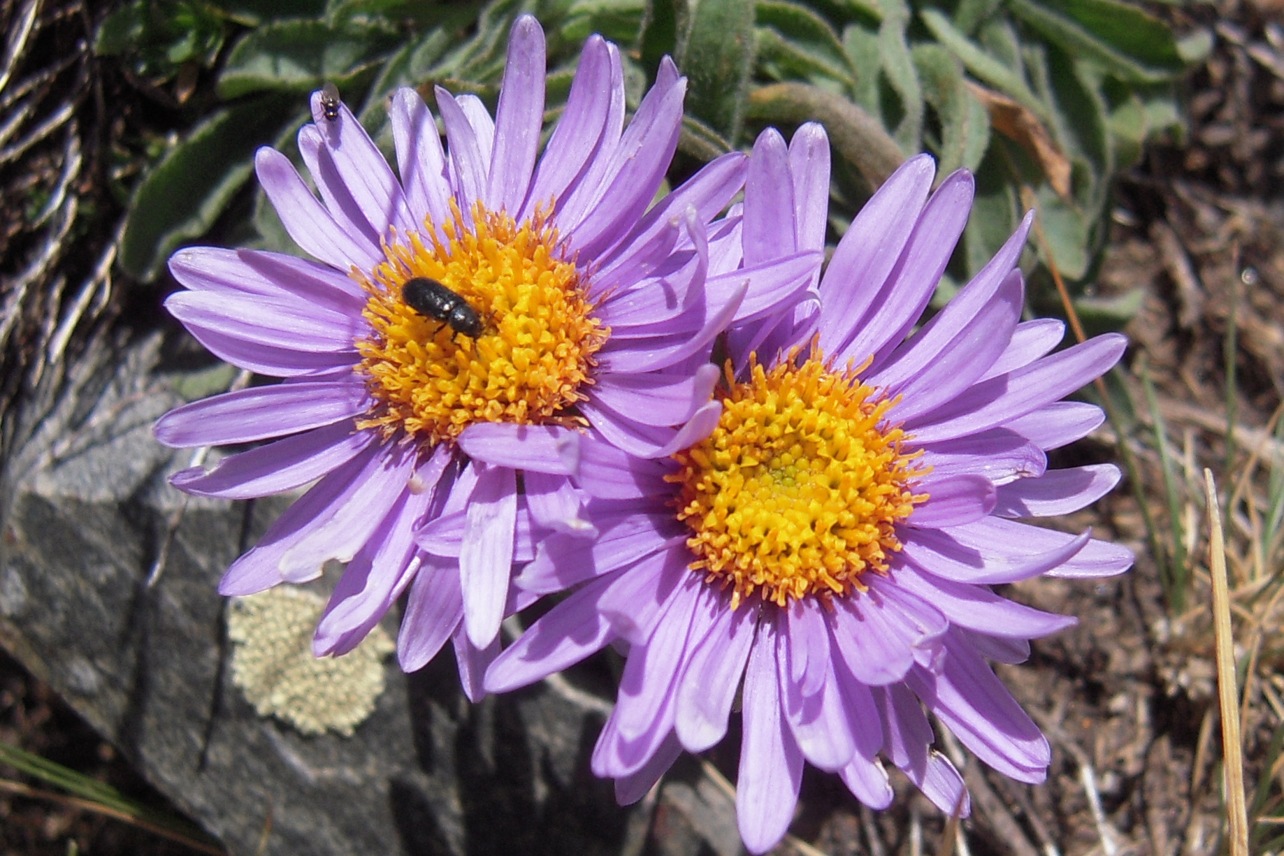 Aster amellus, Megève, Haute-Savoie, France